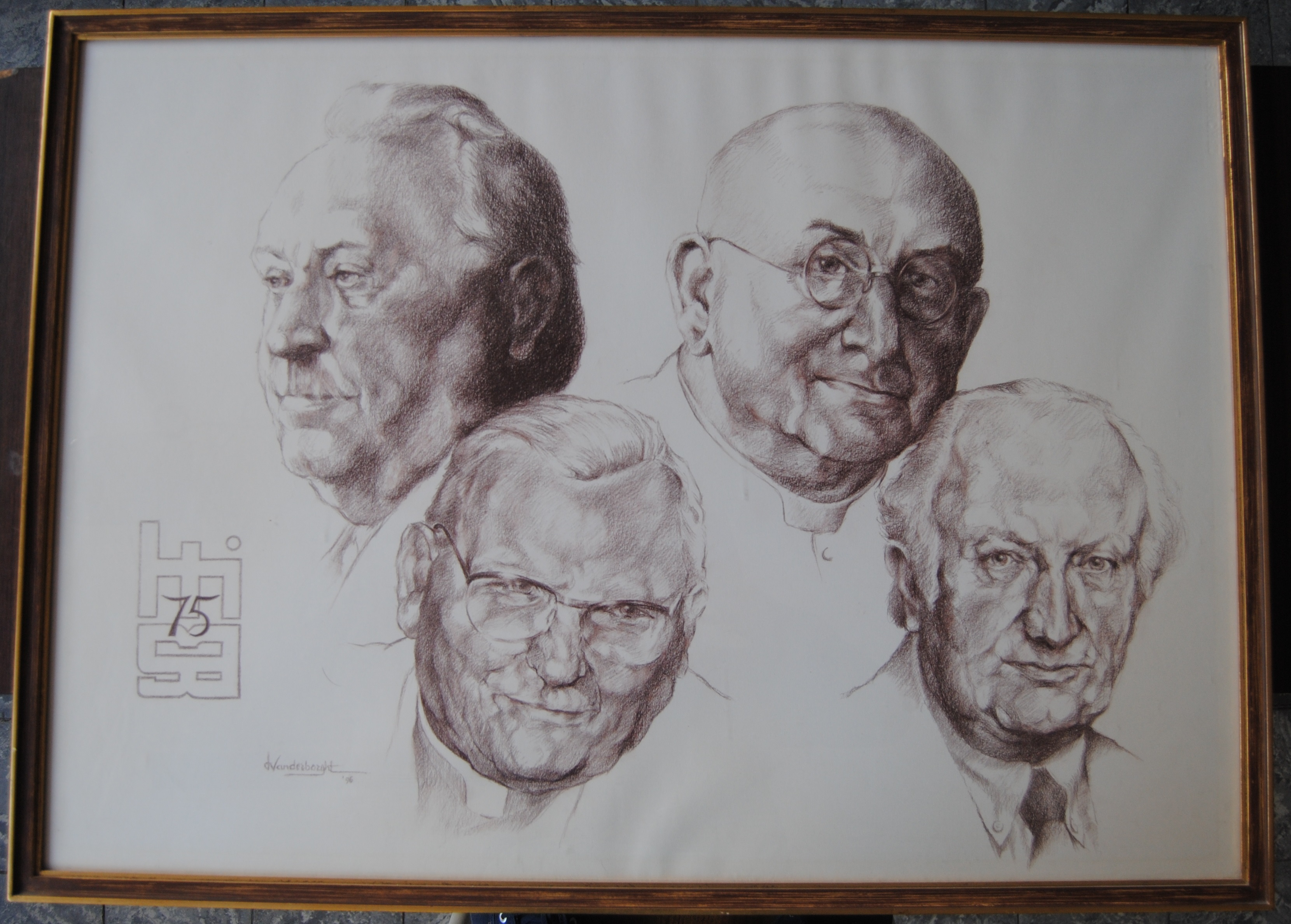 Foto van de kader in het oude vergaderlokaal - De eerste 4 directeur van het HTISA